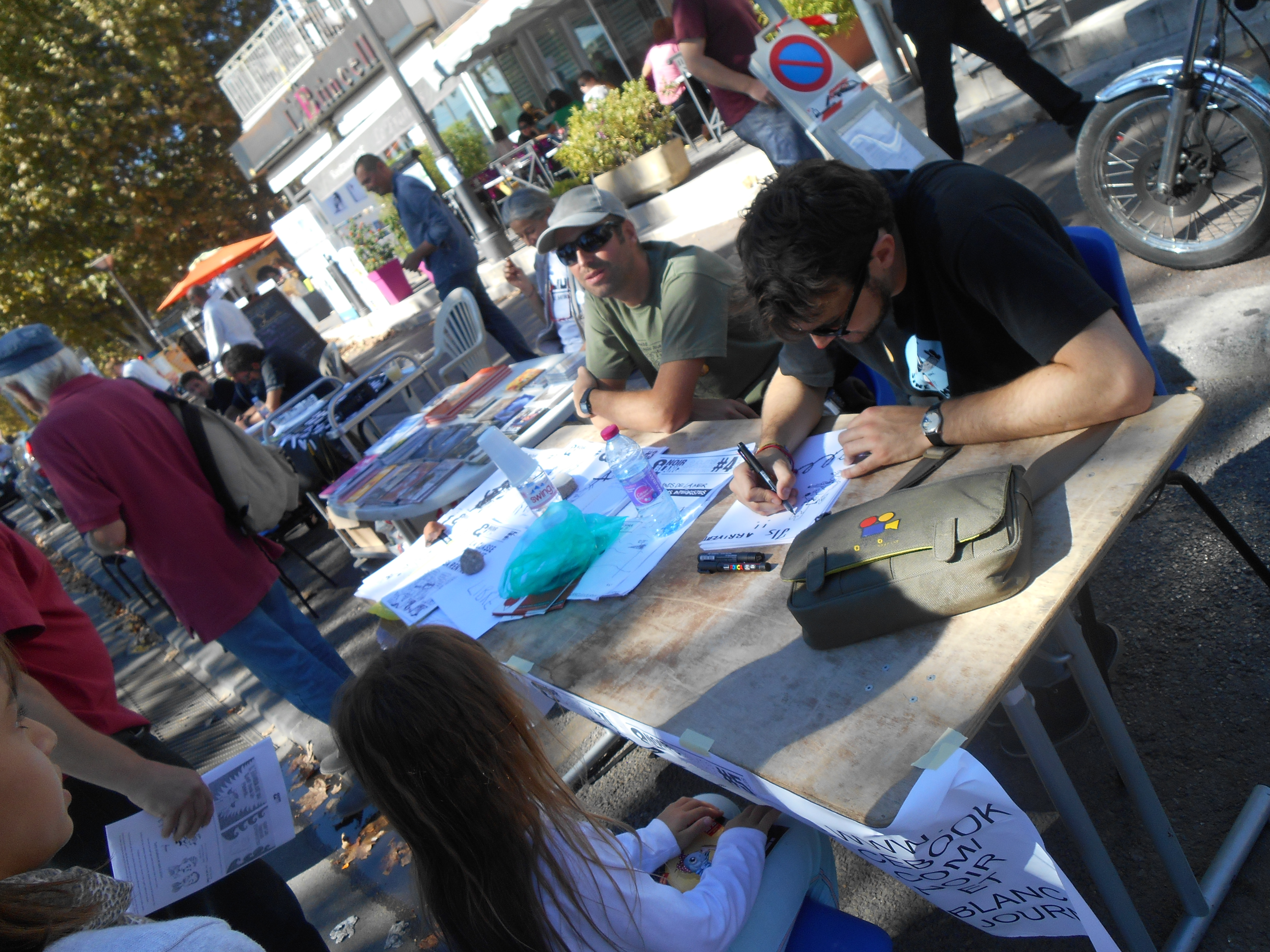 Fidep, un caricaturiste croque le portrait d'un enfant